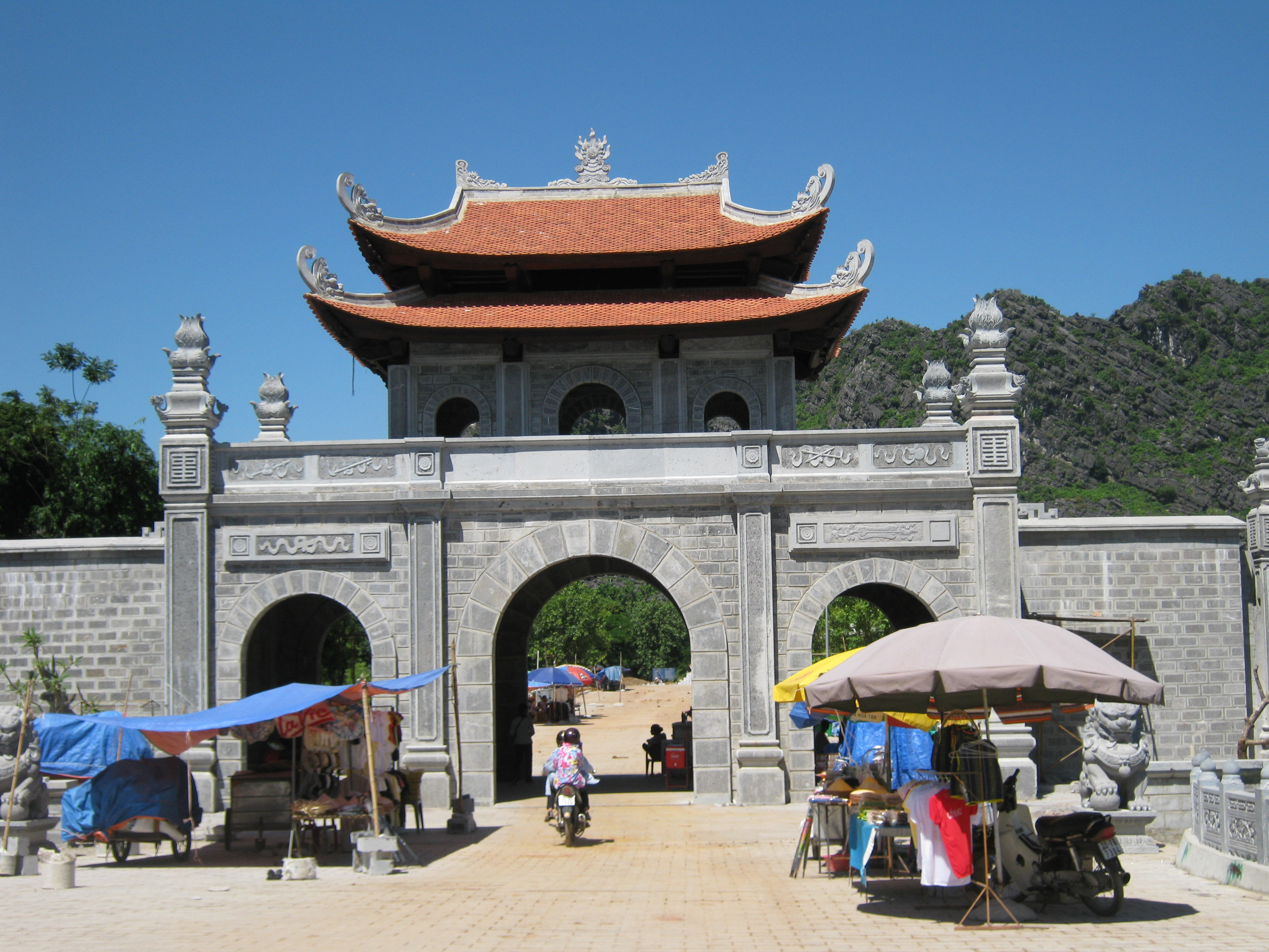 Phong cảnh cố đô Hoa Lư, Ninh Bình, mùa thu năm 2010